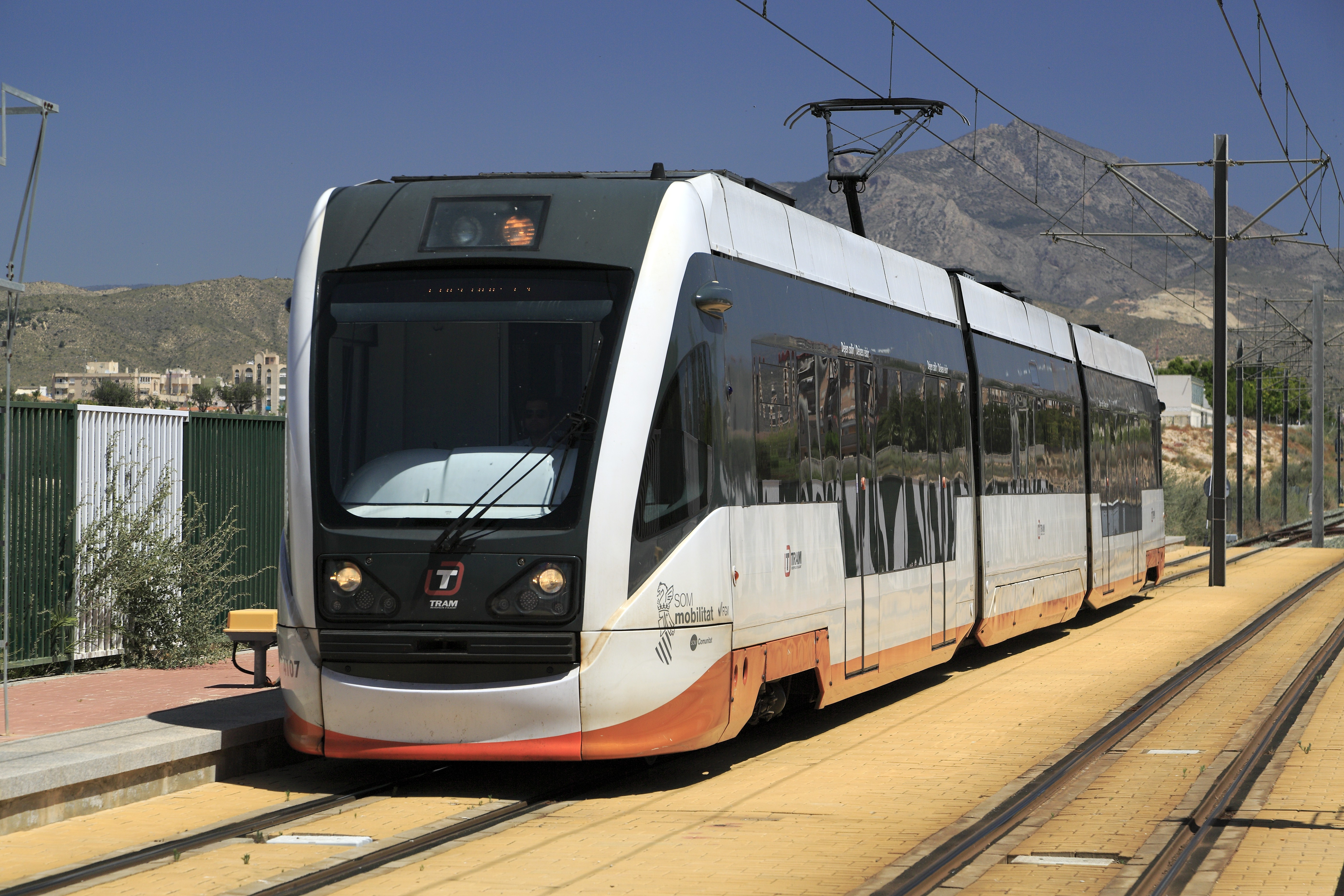 Zug der Linie 1 Benidorm–Alicante-Luceros, ohne Halt zwischen El Campello und Lucentum. Die einzelnen Teile der »Citylink«-Triebwagen erhielten im Gegensatz zu den Multigelenkwagen der Reihe 4200 von denFGV unterschiedliche Wagennummern, die Endteile 410x und 415x und das Mittelteil 610x mit jeweils gemeinsamer Einerstelle.